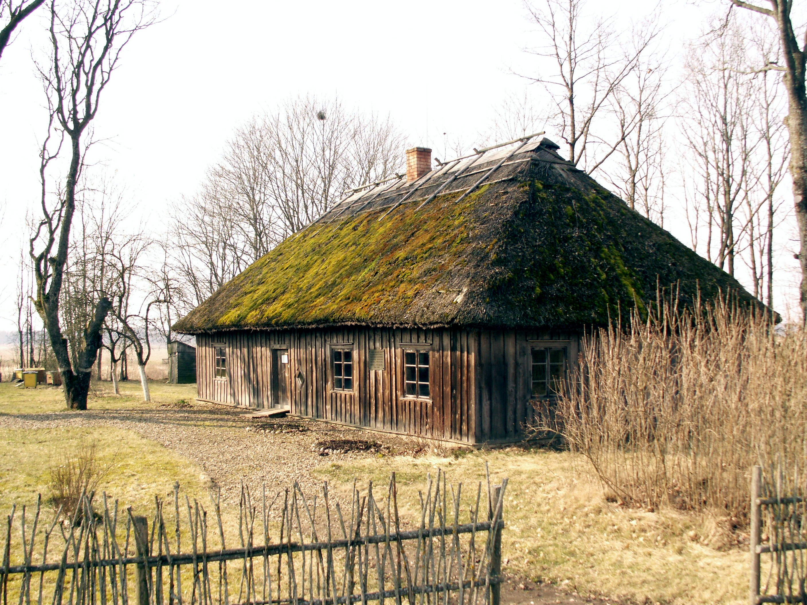 Povilas Višinskis native home